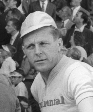 Start Ronde van Nederland Stadion Utrecht . Duitse ploeg (Continental) kopman Gunter Pankoke